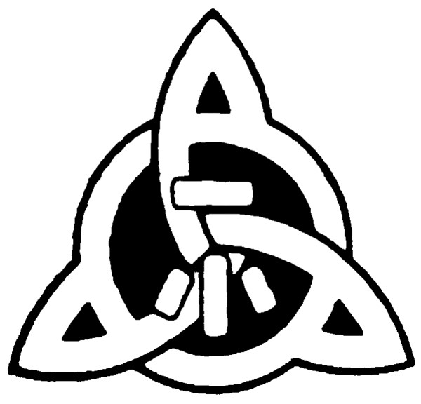 阿見町立阿見第一小学校の校章です。